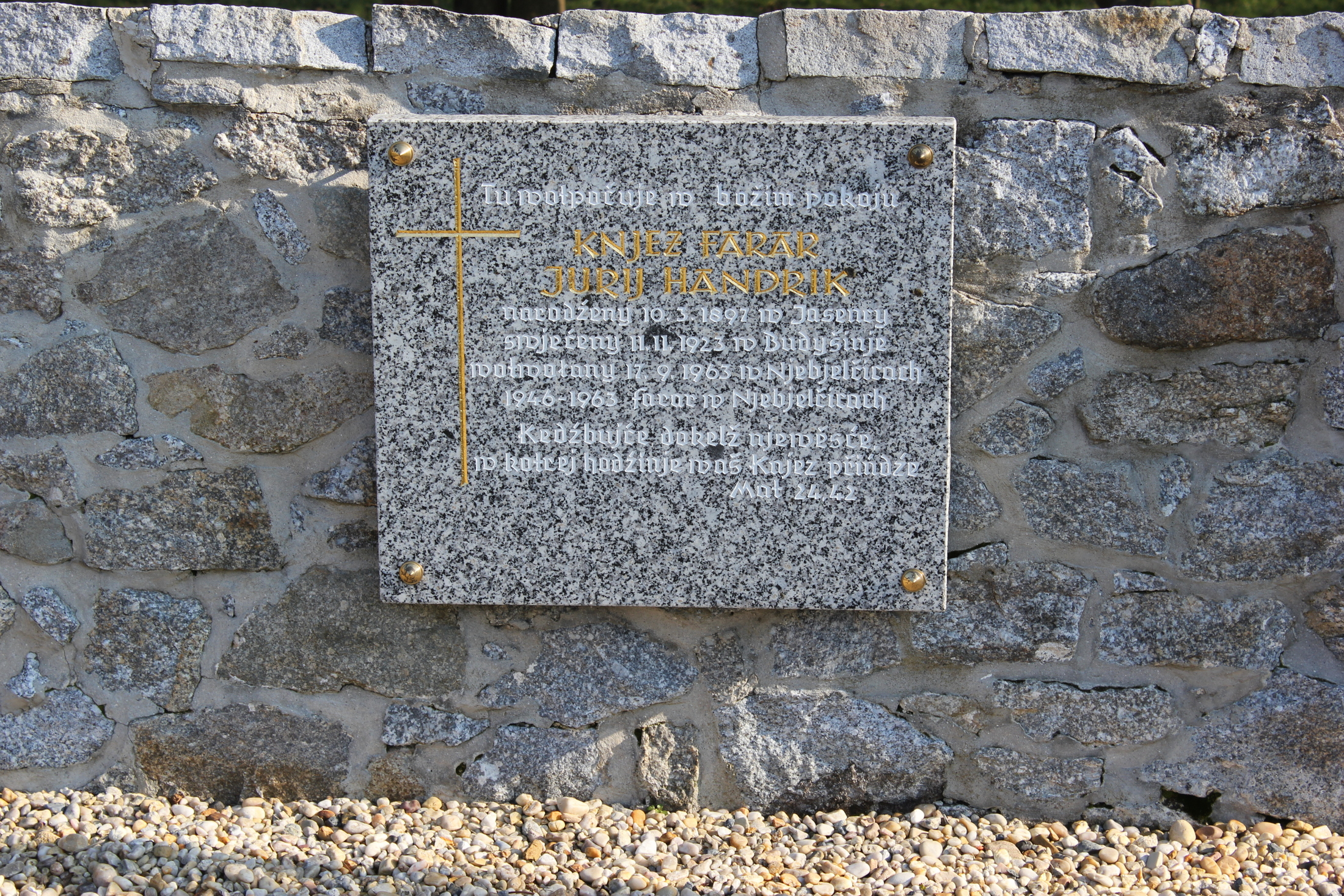 Hornjoserbsce: Na Njebjelčanskim kěrchowje. Row fararja Jurja Handrika (1897–1963).